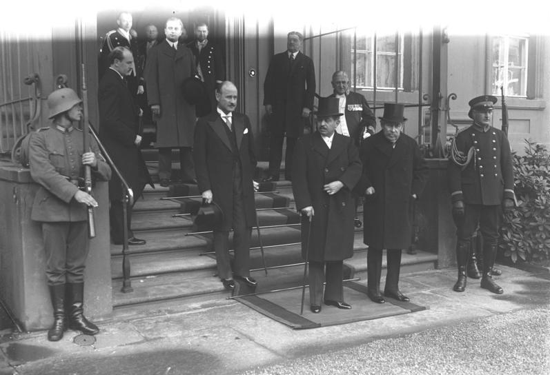 Der französische Ministerbesuch in Berlin ! Der Empfang der französischen Minister beim Reichspräsidenten von Hindenburg. von rechts nach links: der französische Aussenminister Briand, der französische Ministerpräsident Laval und der französische Botschafter in Berlin Francois-Poncet beim Verlassen des Reichspräsidentenpalais.